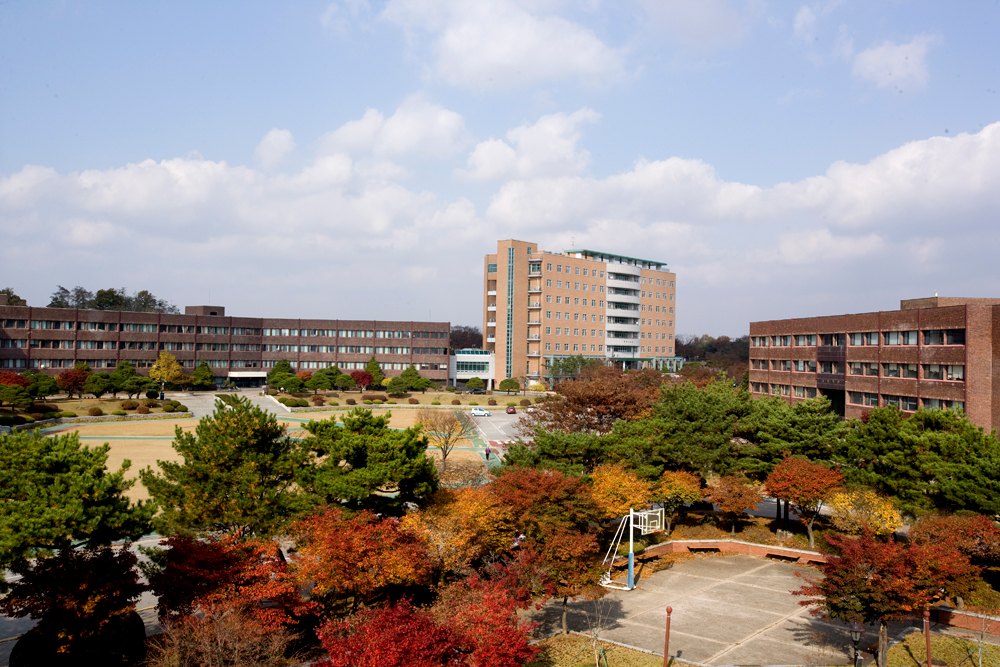 한국교원대학교 캠퍼스. 학생회관 옥상에서 촬영. 좌측부터 인문관, 종합교육관, 교양학관 건물.